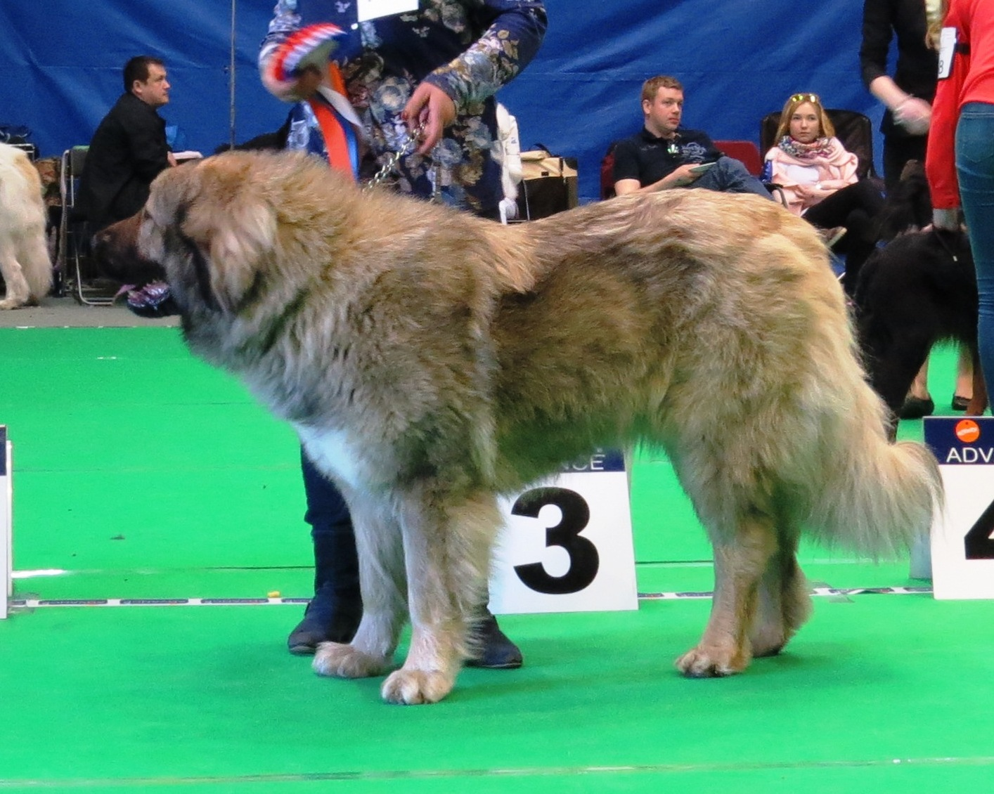 Кавказская овчарка СПб